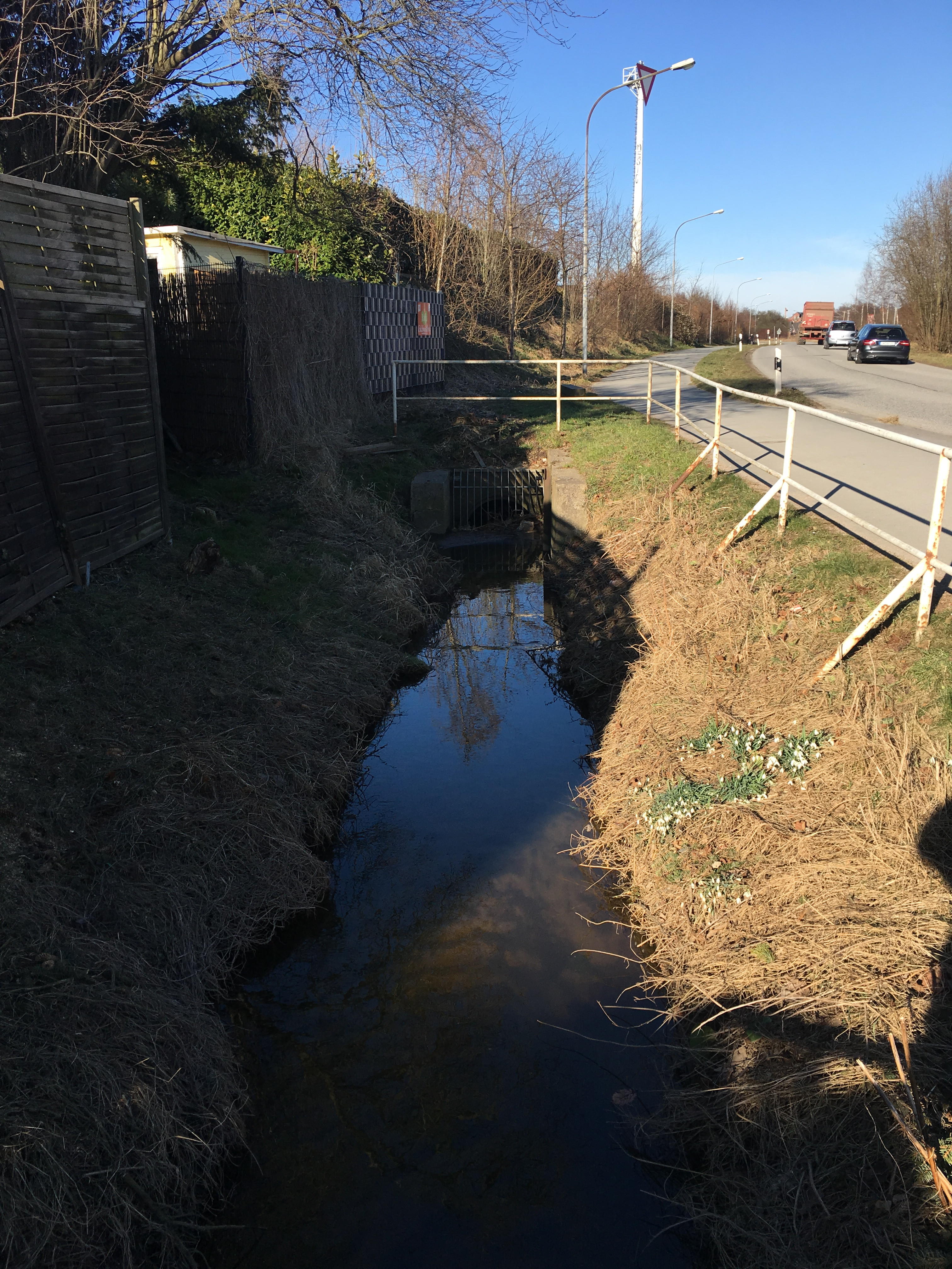 Eintritt der Rönnau in den letzten Verrohrungsabschnitt zur Siechenbucht der Trave.